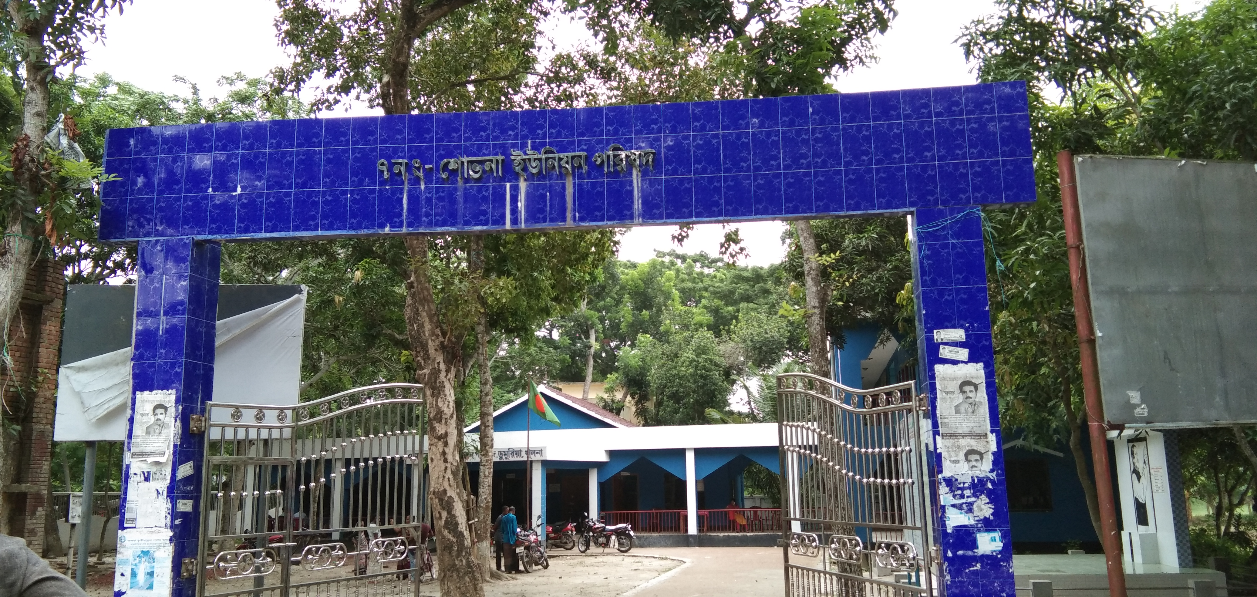 শোভনা ইউনিয়ান